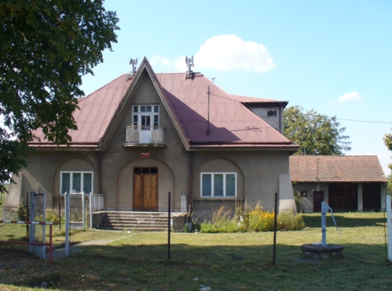 Ispina, szkoła